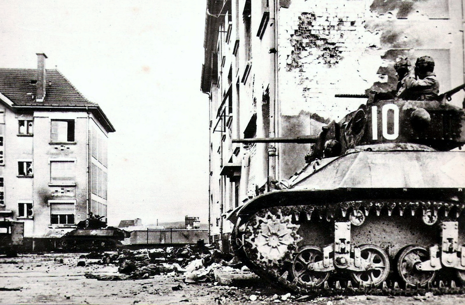 Carri armati della 1re division blindèe vicino al confine svizzero nel novembre 1944